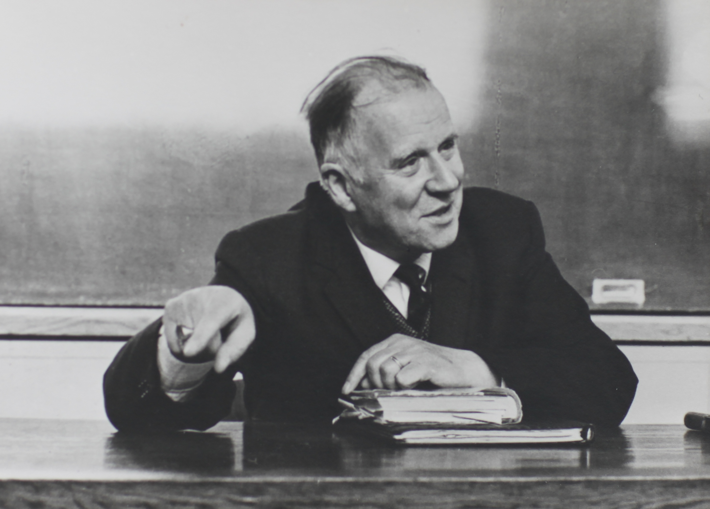 Foto aus Familienbesitz; erstellt im Jahr 1970 während einer öffentlichen Vorlesung an der Uni Freiburg (Schweiz). Fotograf unbekannt, wahrscheinlich inzwischen verstorben. Im Besitz der Familie; Rechte freigegeben durch seine Tochter Verena Baumer-Müller, Freiburg (Schweiz). Gleiches Foto publiziert und freigegeben durch Paulusdruckerei Freiburg (Herausgeber) von "Emil F. J. Müller-Büchi. In memoriam" ISBN 3-72780236-7 im Jahr 1980; Foto wurde von seiner Ehefrau, Beatrix Müller-Büchi (verstorben 1987) damals für den Druck sowie unlimitierte Weiterverbreitung freigegeben. Jetzt im Besitz der Tochter, Verena Baumer-Müller; Freigabe der Rechte für gemeinfreie Publikation in Wikipedia durch sie bestätigt (August 2012).